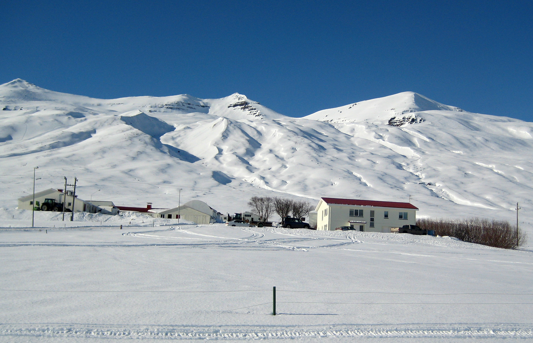 Grund í Svarfaðardal (N-Iceland)